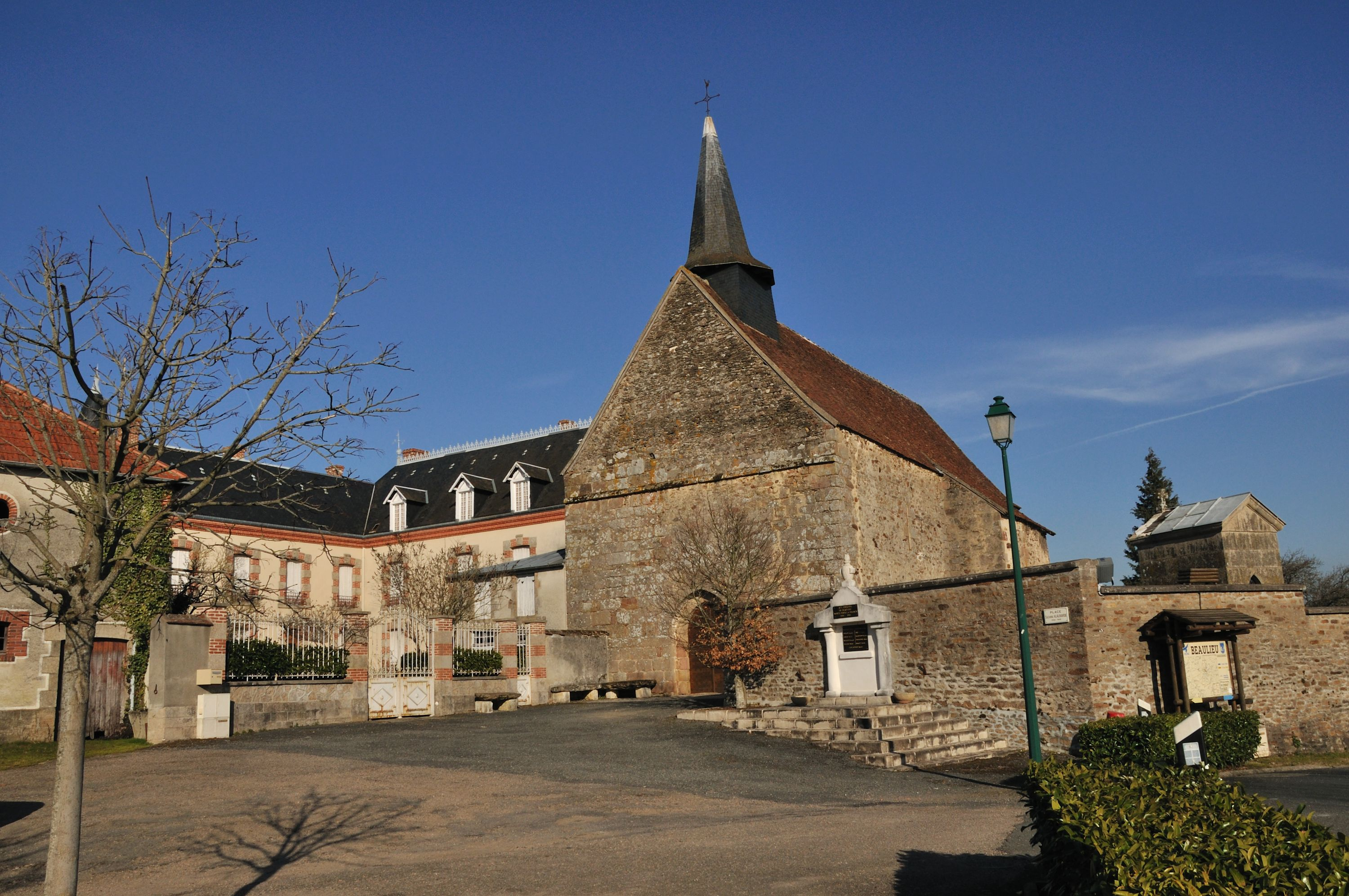 Beaulieu (Indre) - Place de l'église